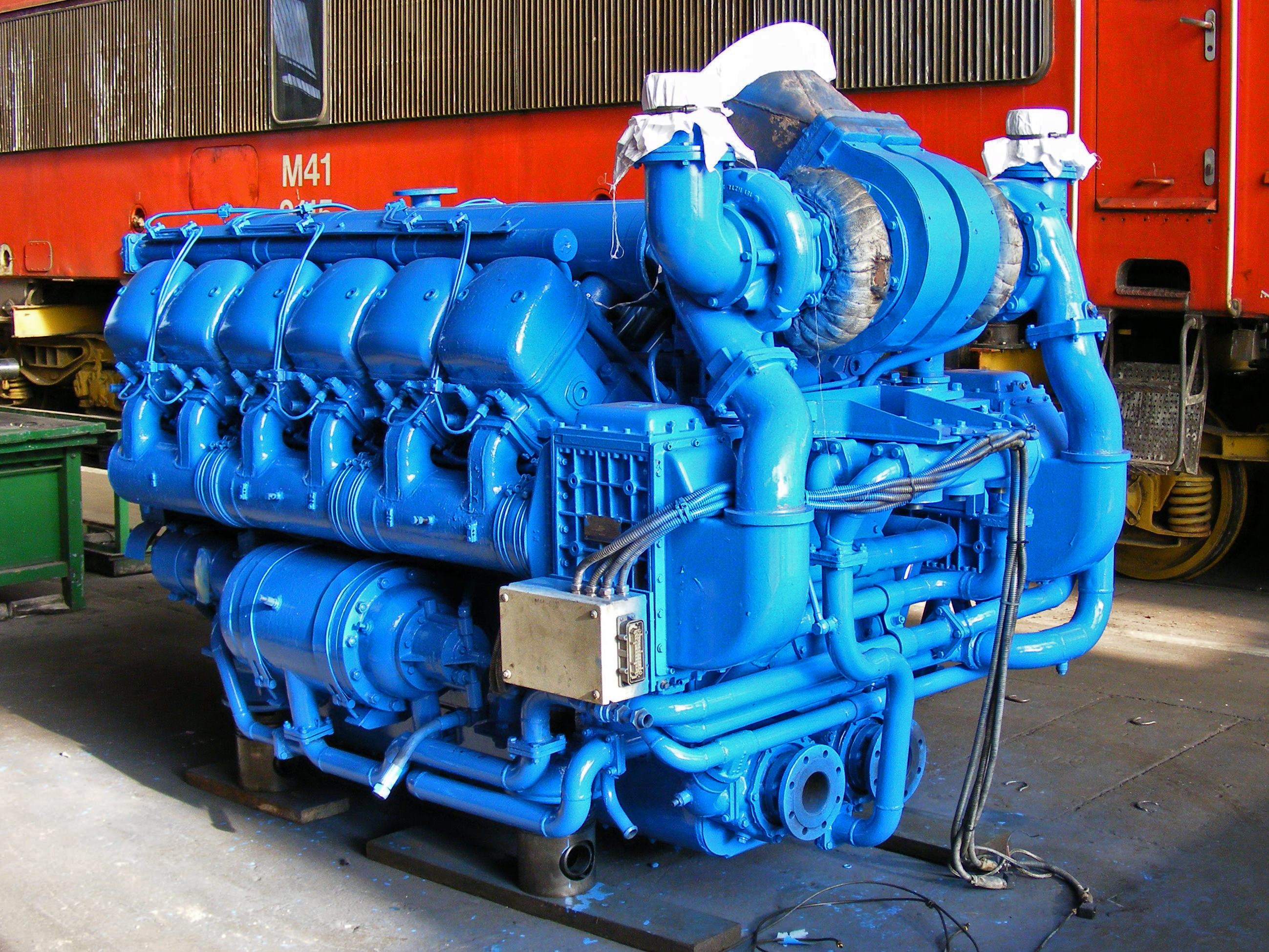 Részben átépített Pielstick 12 PA4 185 dízelmotor kiszerelve egy "Okoska" M41-esből (helyszín: Dombóvár)